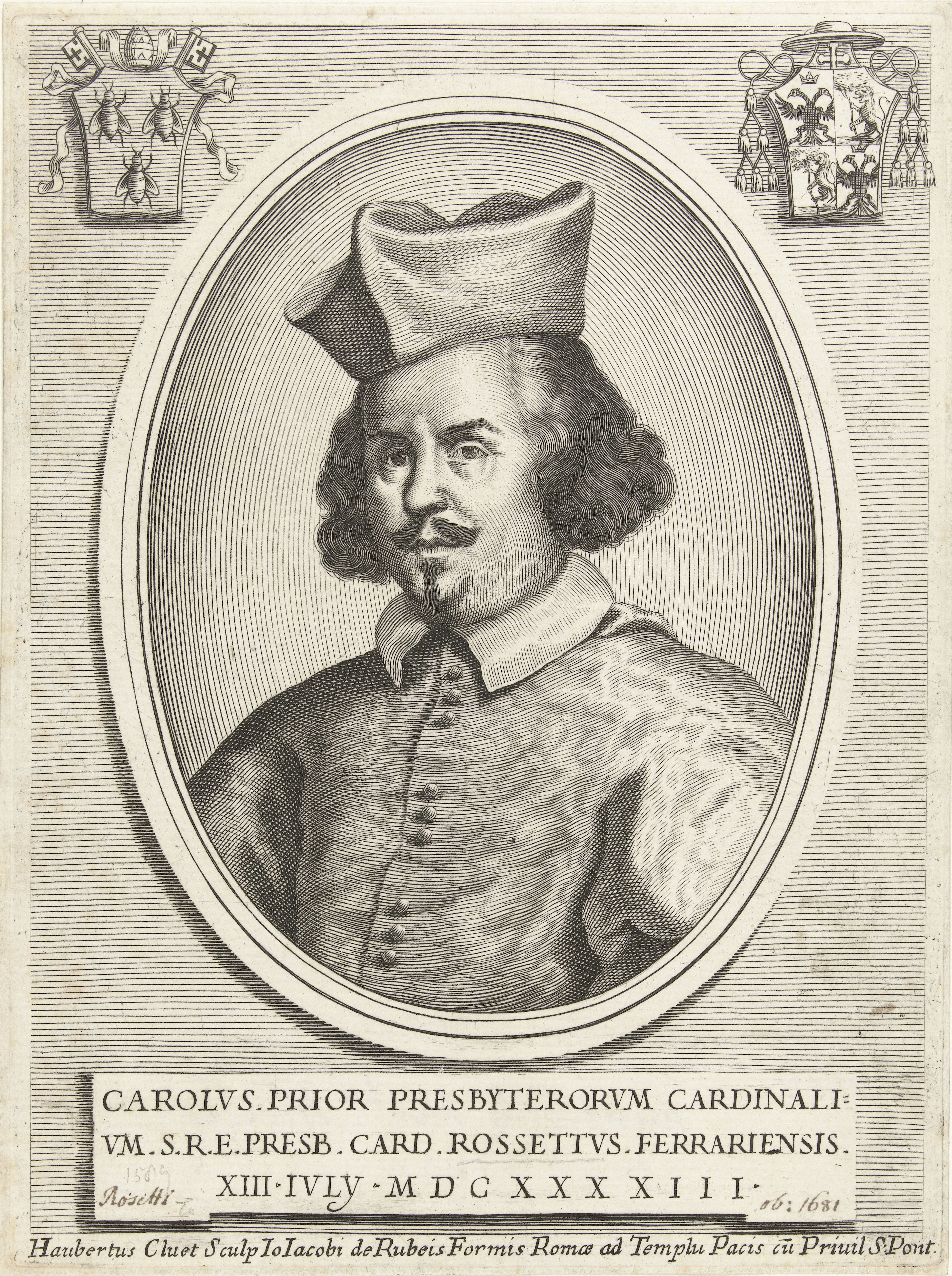 IdentificatieTitel(s): Portret van kardinaal Carlo RossettiEffigies Cardinalium nunc viventium (serietitel)Objecttype: prent Objectnummer: RP-P-1909-4385Catalogusreferentie: Singer 77879Hollstein Dutch 8Opschriften / Merken: verzamelaarsmerk, verso midden, gestempeld: Lugt 2228onderschrift, recto links en rechts onder, handgeschreven: ‘Roseti ob: 1681’Omschrijving: Portret in ovale lijst van kardinaal Carlo Rossetti. Buste naar links. Bovenaan links het wapen van paus Urbanuss VIII, bovenaan rechts het wapen van kardinaal Carlo Rossetti. De prent heeft een Latijns onderschrift met gegevens over de geportretteerde.VervaardigingVervaardiger: prentmaker: Albertus Clouwet (vermeld op object)naar eigen ontwerp van: Albertus Clouwetuitgever: Giovanni Giacomo de'Rossi (vermeld op object)Plaats vervaardiging: RomeDatering: 1646 - 1679Fysieke kenmerken: gravureMateriaal: papier Techniek: graveren (drukprocedé)Afmetingen: plaatrand: h 193 mm × b 143 mmToelichtingdeel van een serie met als titel "Effigies Cardinalium nunc viventum". De serie bestaat uit portretten van kardinalen.OnderwerpWie: Carlo RossettiVerwerving en rechtenVerwerving: aankoop 1905Copyright: Publiek domein